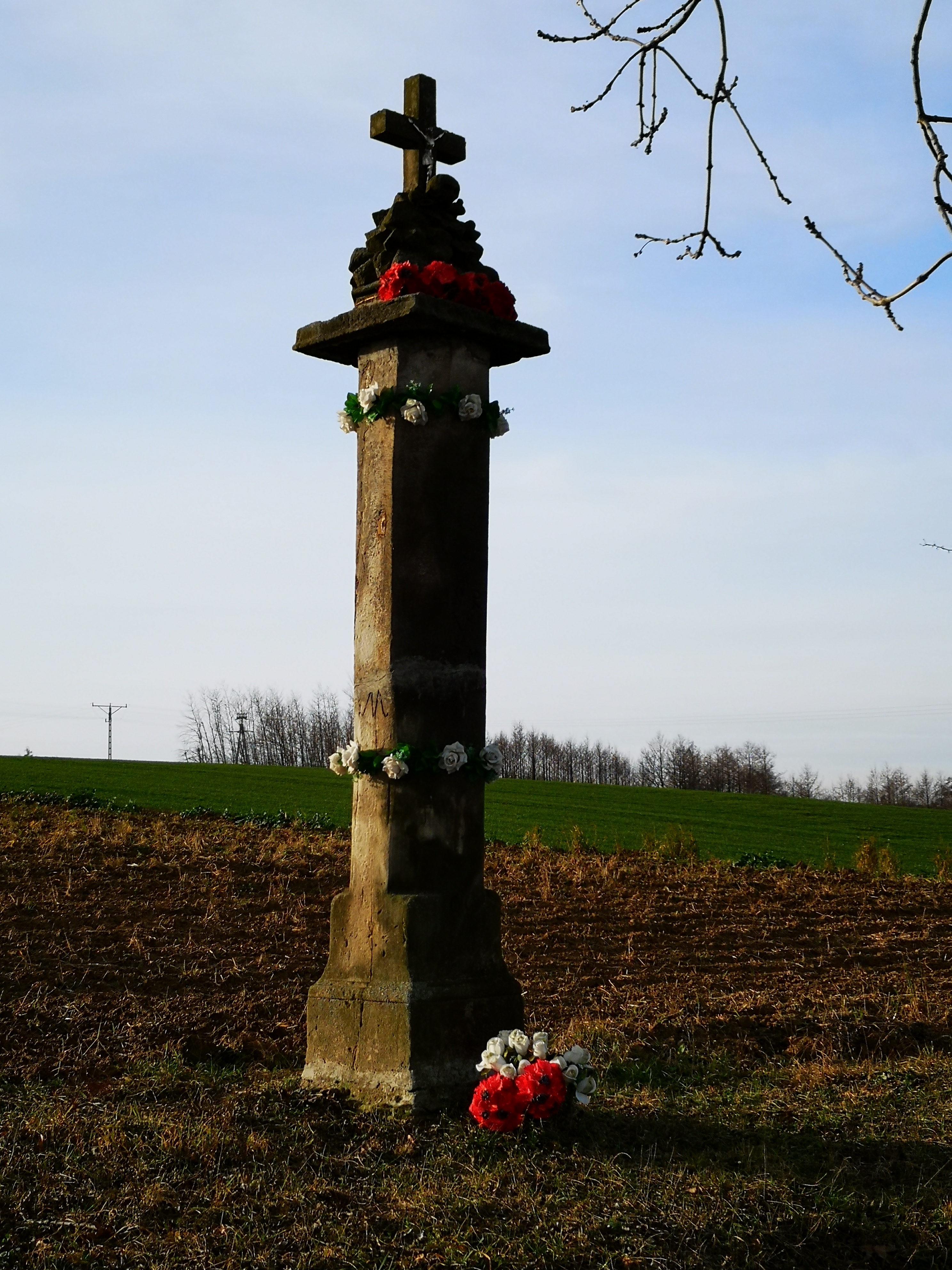 Krzyż przydrożny na drodze Boksyce - Momina